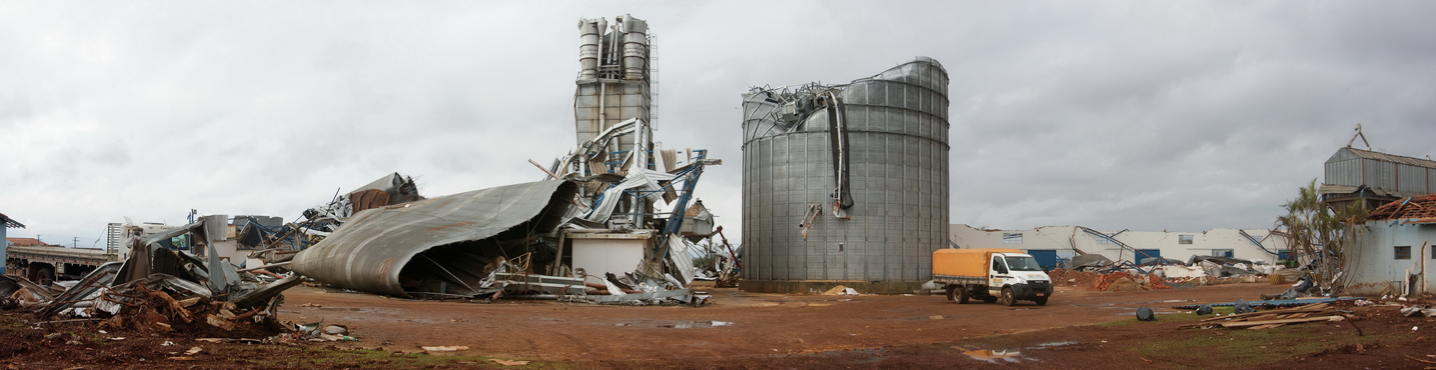 Imagem do tornado que atingiu o município de Taquarituba em 22 de setembro de 2013, estado de São Paulo, Brasil.